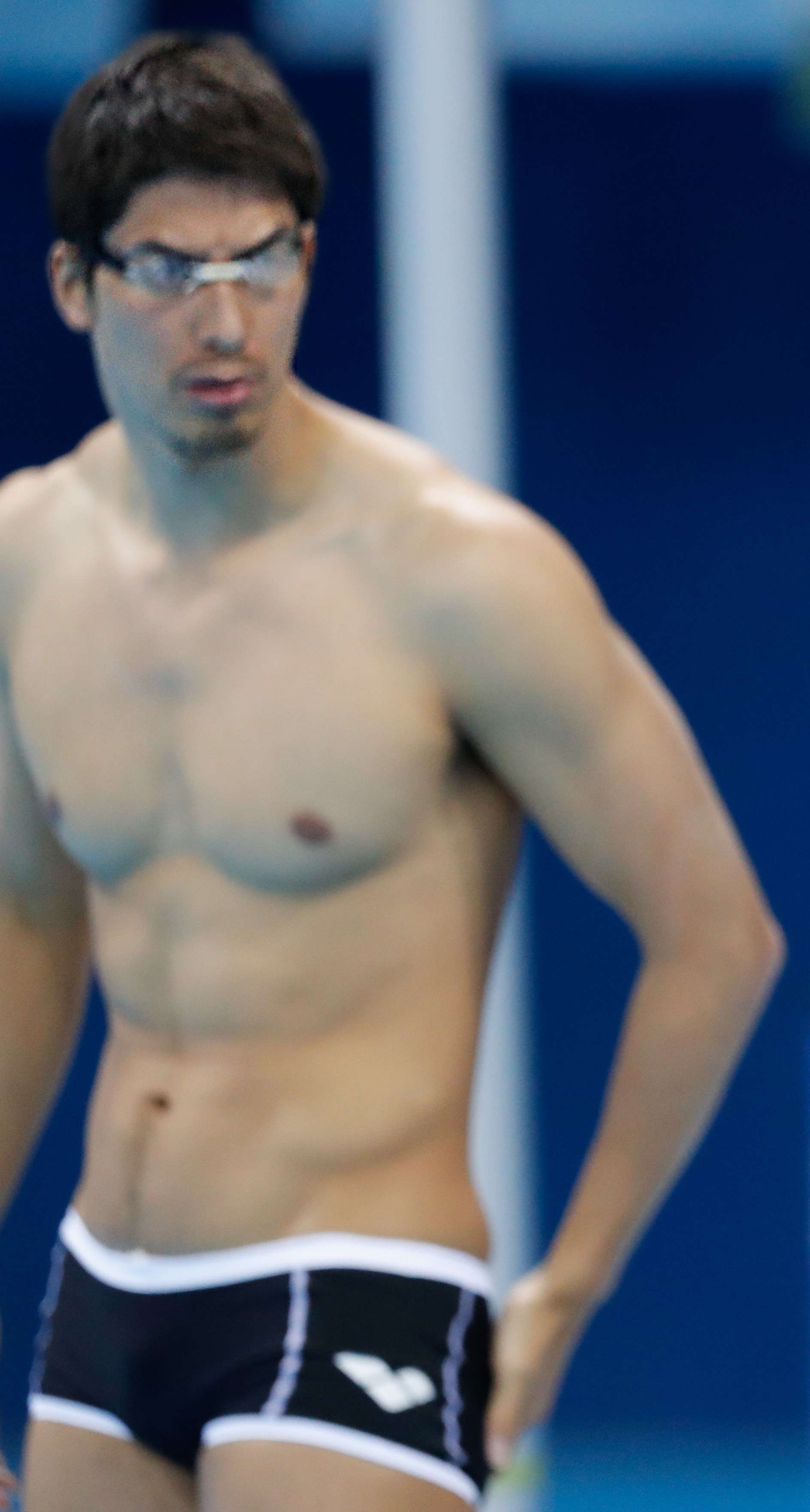 Rio de Janeiro - Atletas da equipe natação do Japão treinam na piscina do Estádio Aquático, no Parque Olímpico da Barra da Tijuca (Fernando Frazão/Agência Brasil)